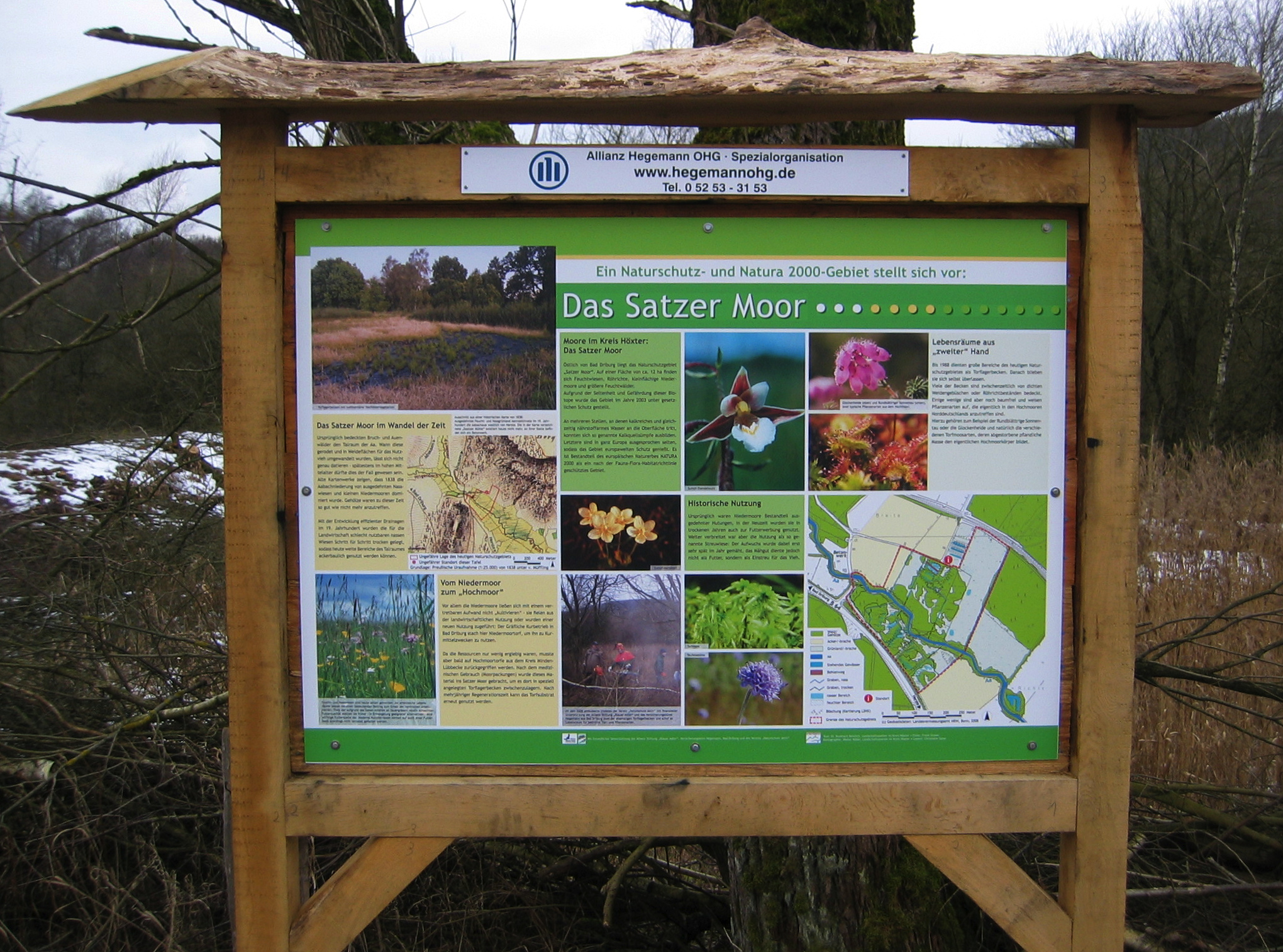 Informationstafel der Landschaftsstation im Kreis Höxter am Naturschutzgebiet Satzer Moor, Bad Driburg, Deutschland.